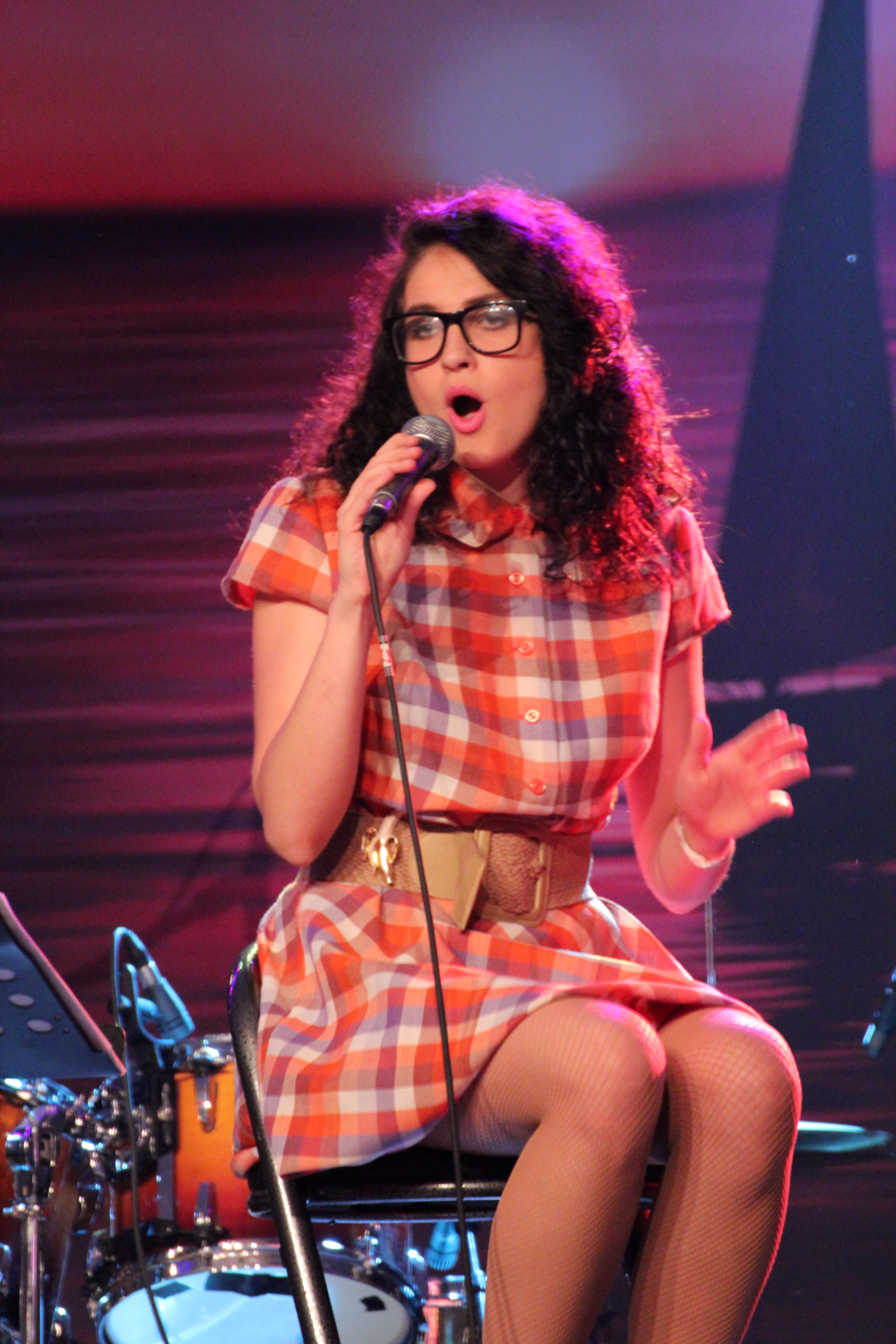 Kadri Kasak esinemas Õllesummeril.